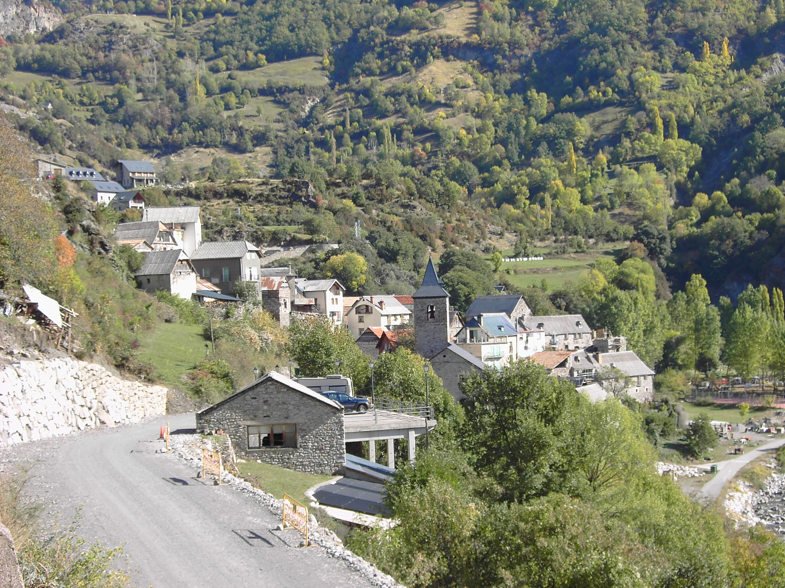 Obras de acondicionamiento de la entrada de San Juan de Plan, en octubre de 2007.